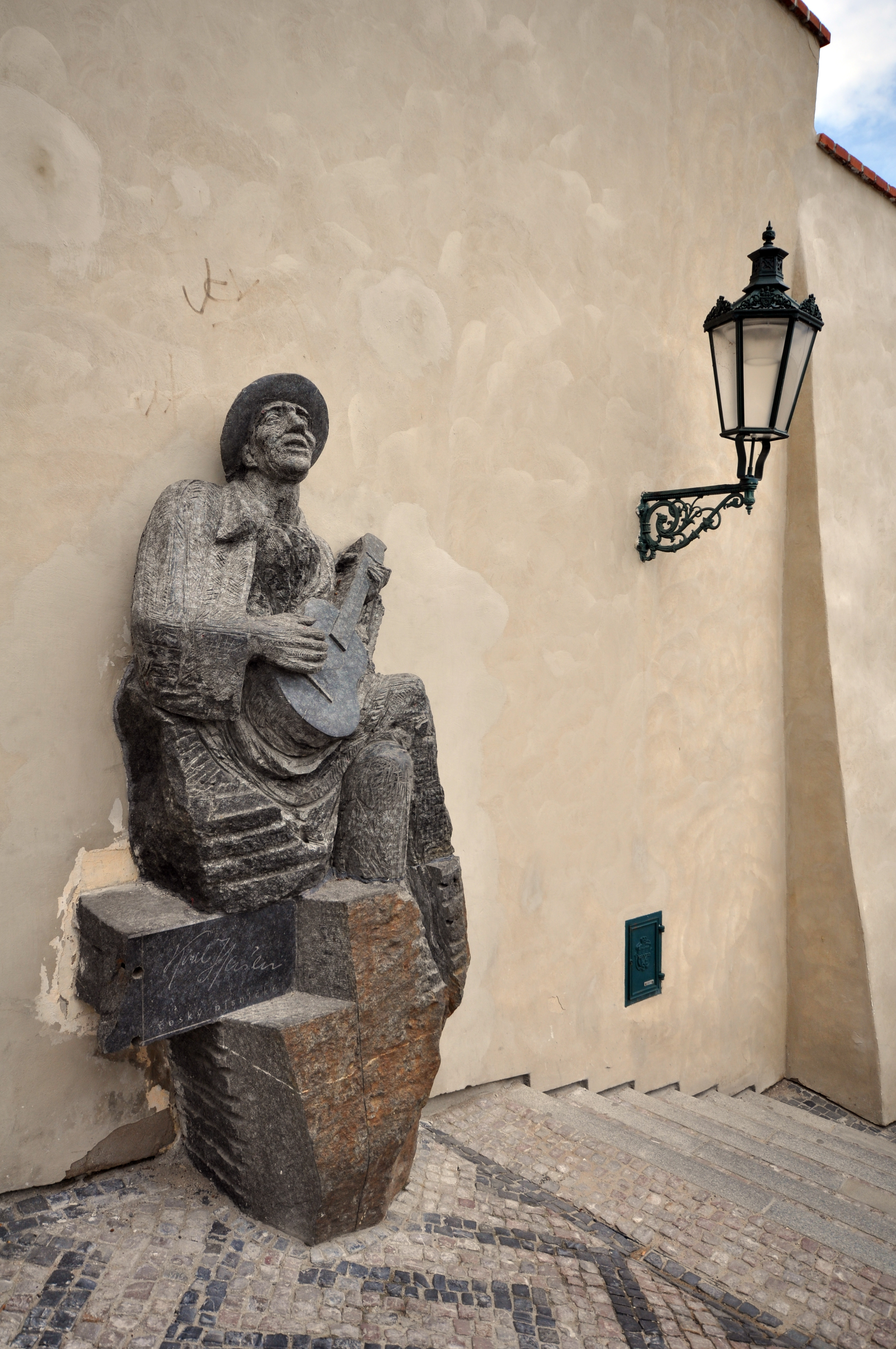 Prag